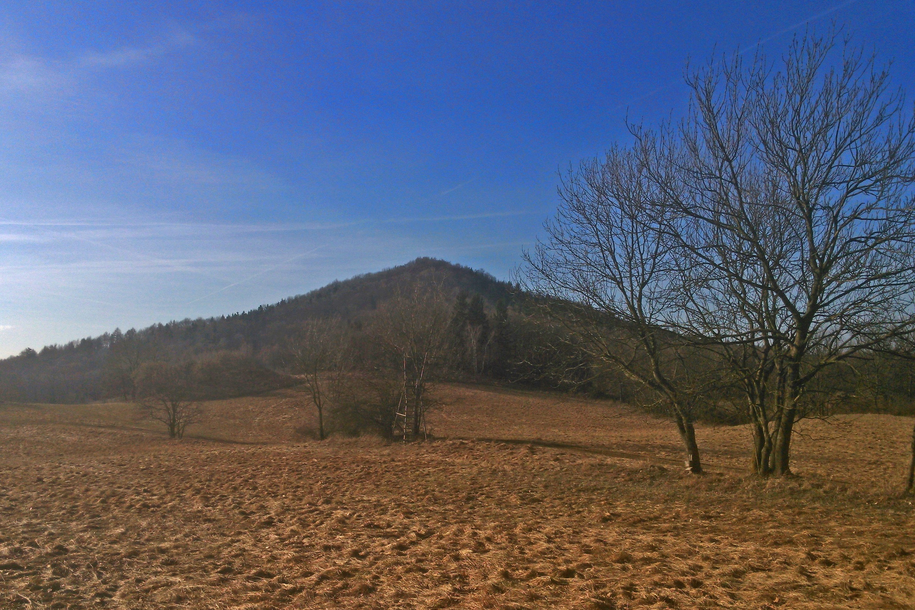 Lotarův vrch u Jílové.